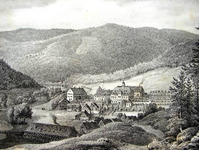 Stich von Blauenthal, um 1840